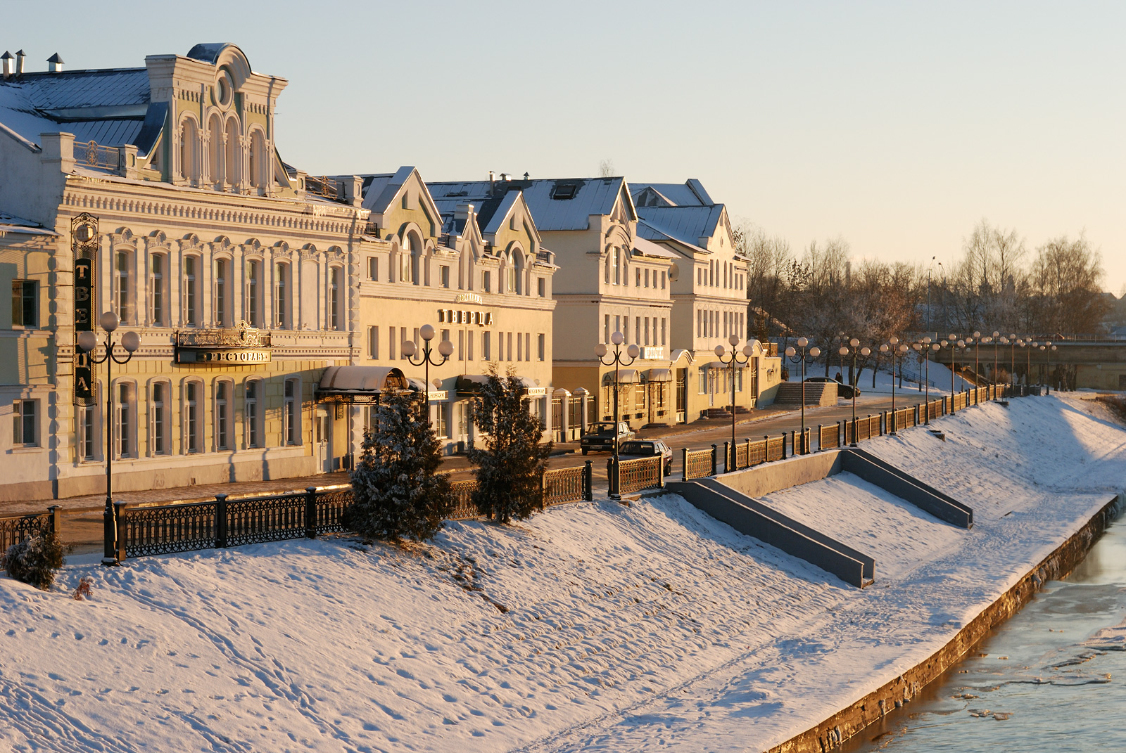 Torzhok, enbankment